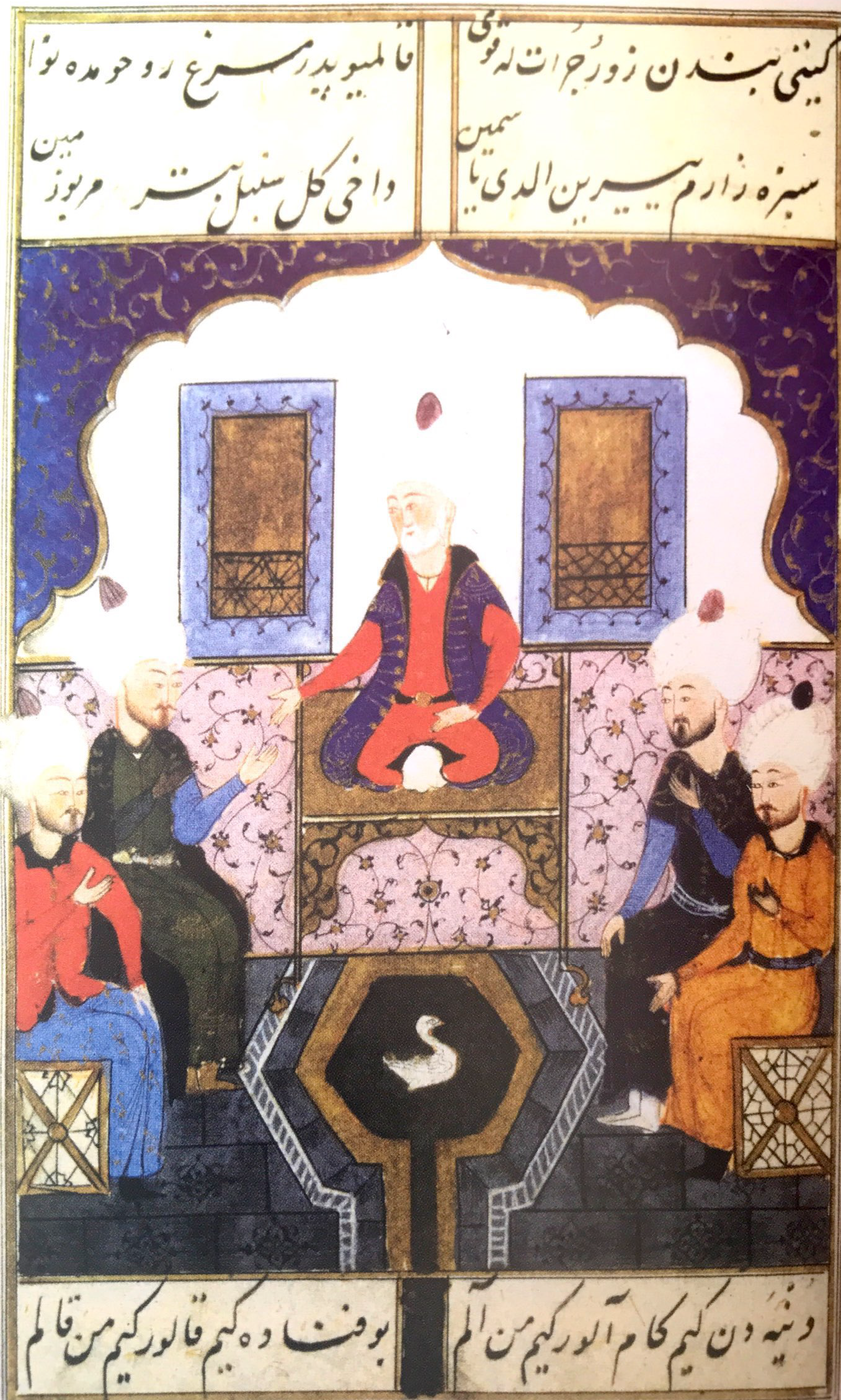 II. Bayezid, taht sorunlarını vezirleri ile tartışıyor (Selimname)